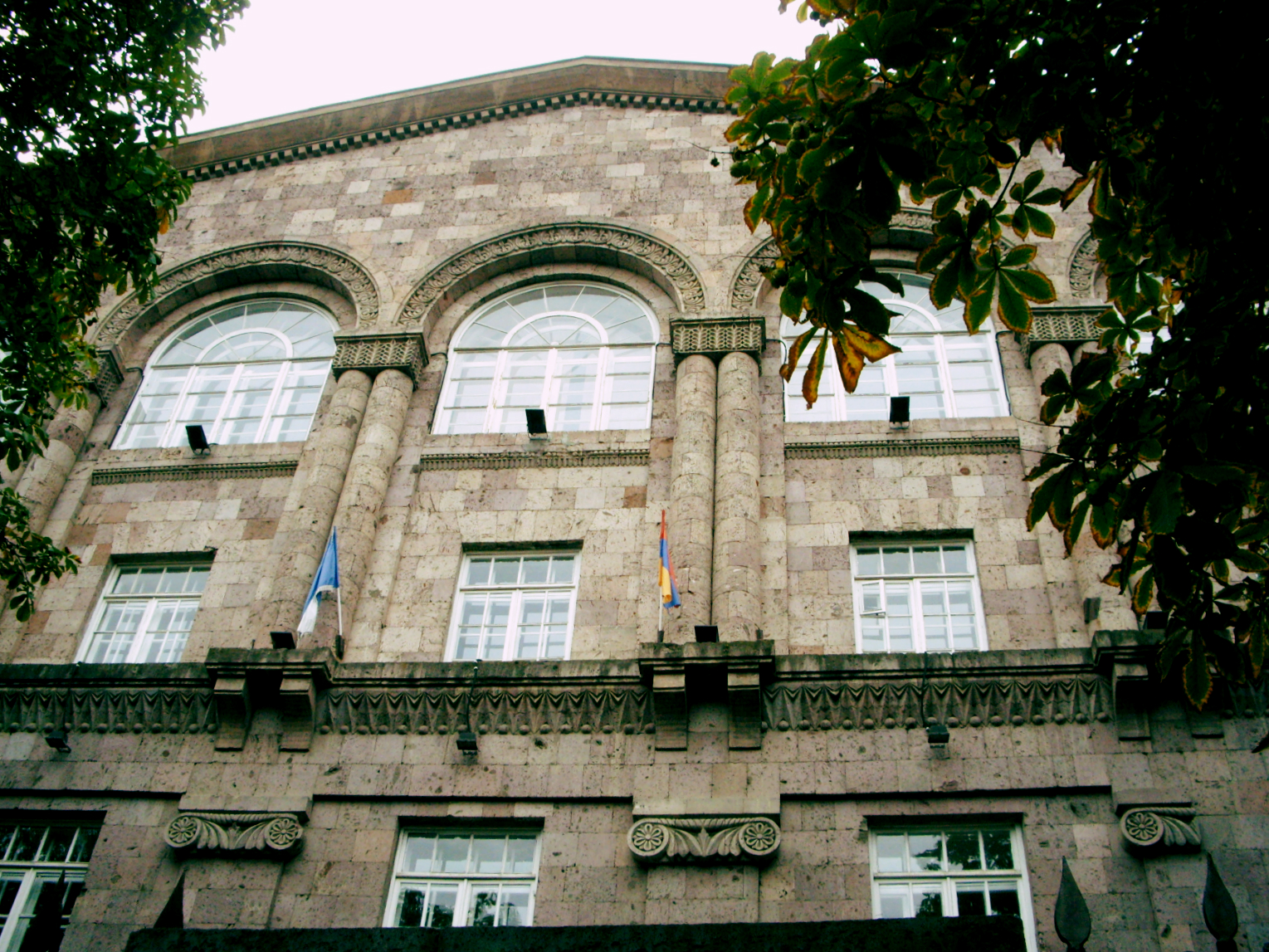 Վանաձորի պետական մանկավարժական ինստիտուտ, 1950-ական թթ., ճարտ. Գ. Աղաբաբյան 1/45